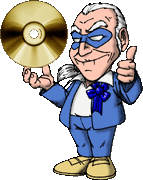 Diseño original para el trofeo GoldSpirit